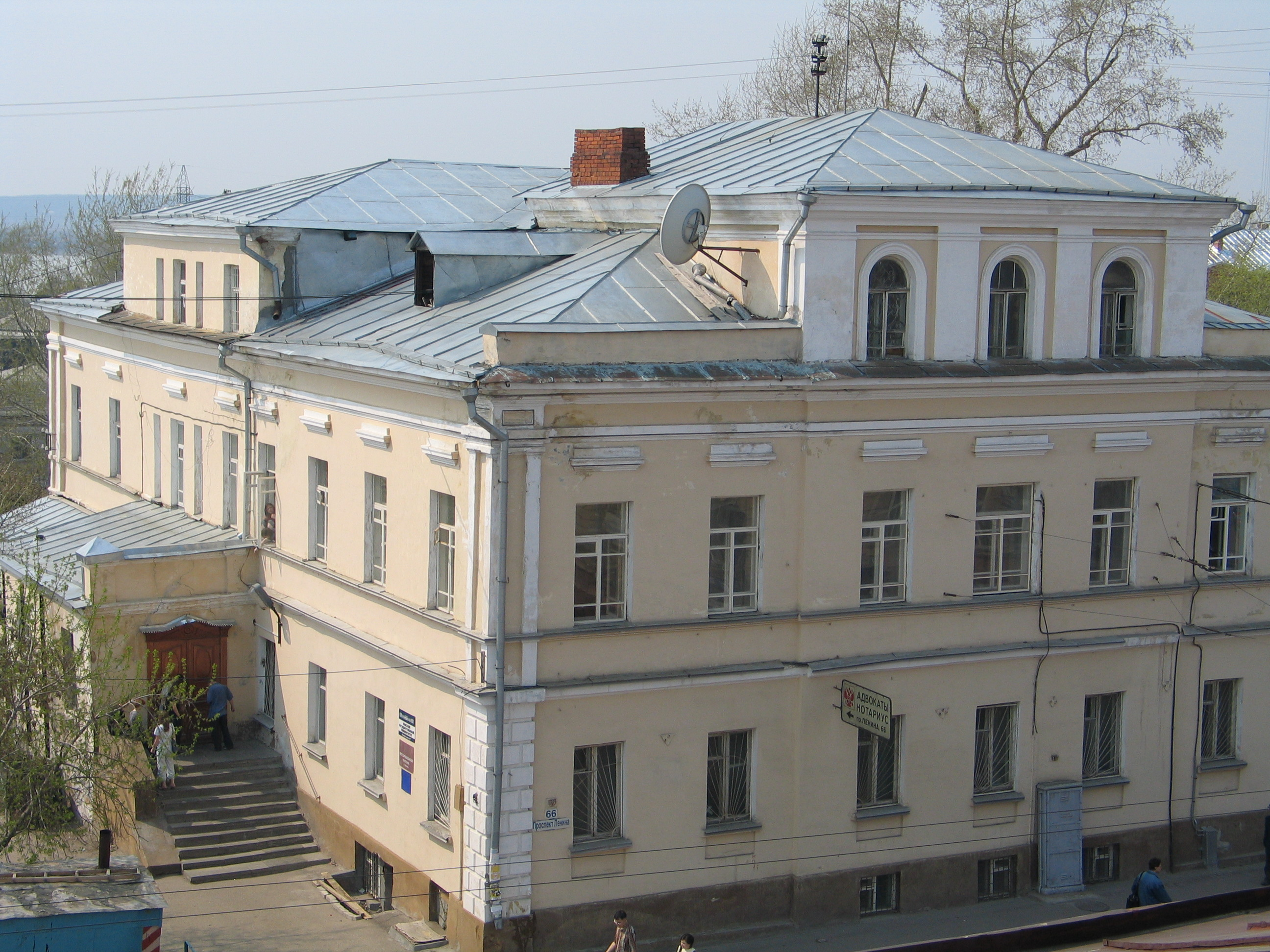 Седьмой корпус ТГУ, пр. Ленина 66, вид с соседнего здания.